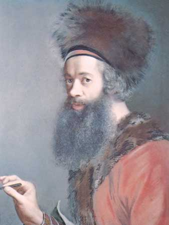 Self-portrait